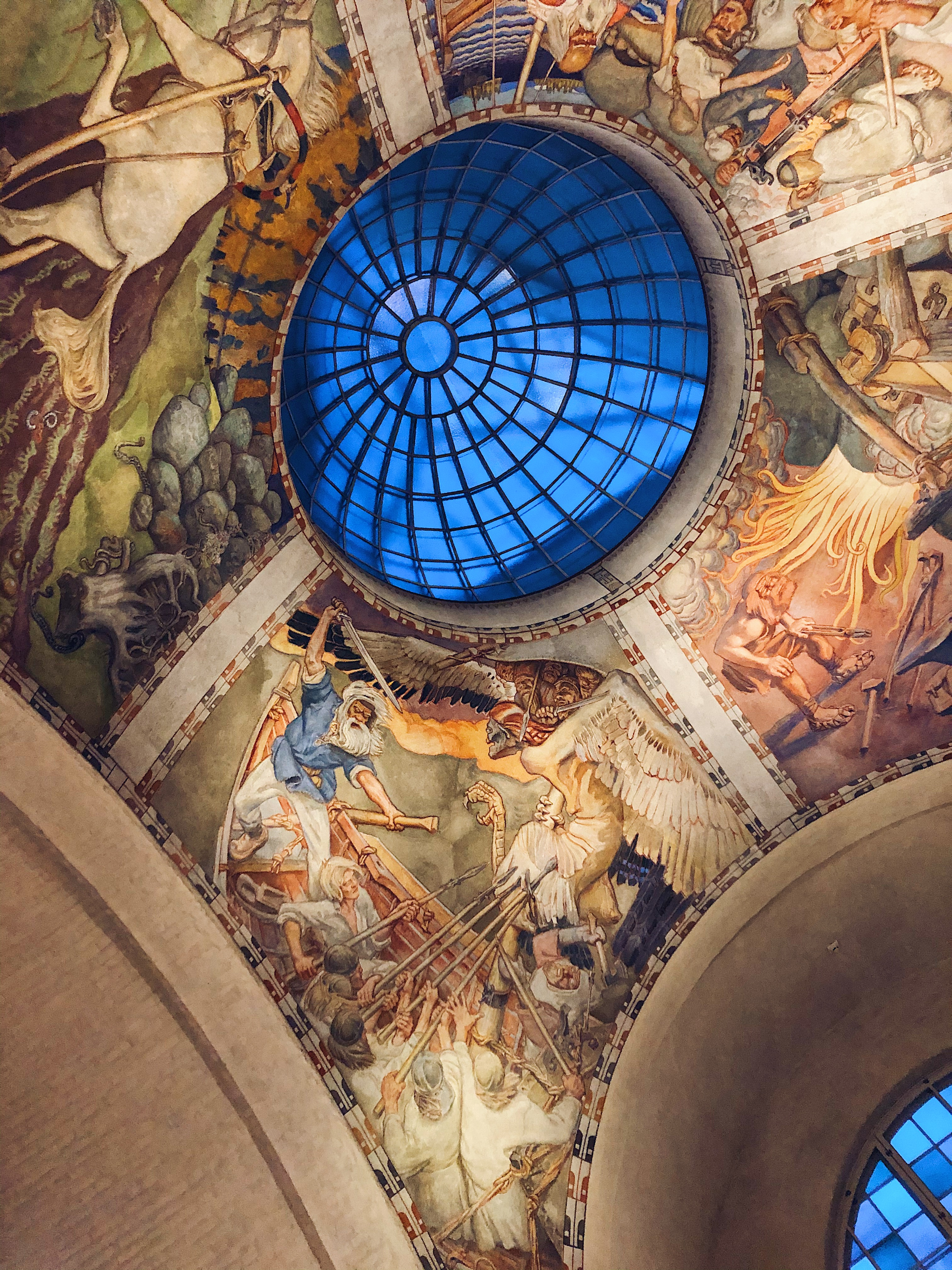 Takmålning i Hesingfors Nationalmuseumet.